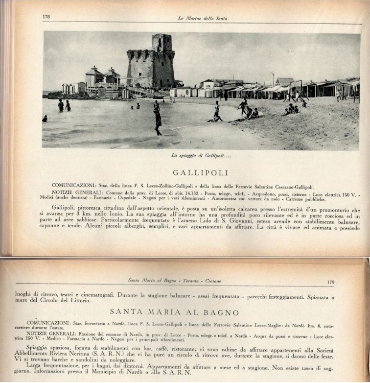 Guida Pratica ai Luoghi di Soggiorno e di Cura in Italia, edizione del 1933